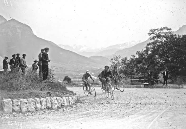 12-7-23, Briançon, un peloton emmené par [Ottavio] Bottecchia [pour le Tour de France cycliste]